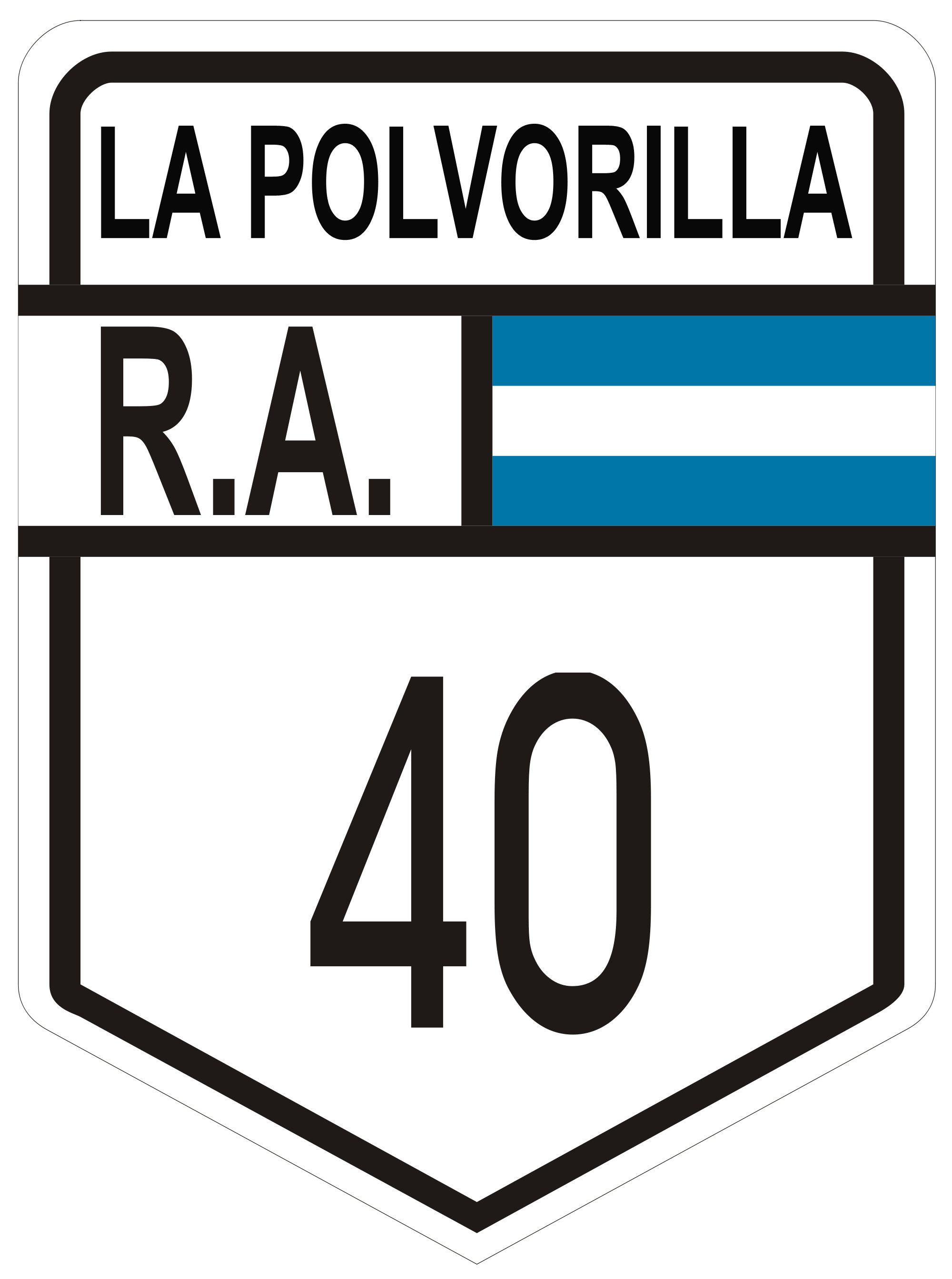 La Polvorilla - RN40